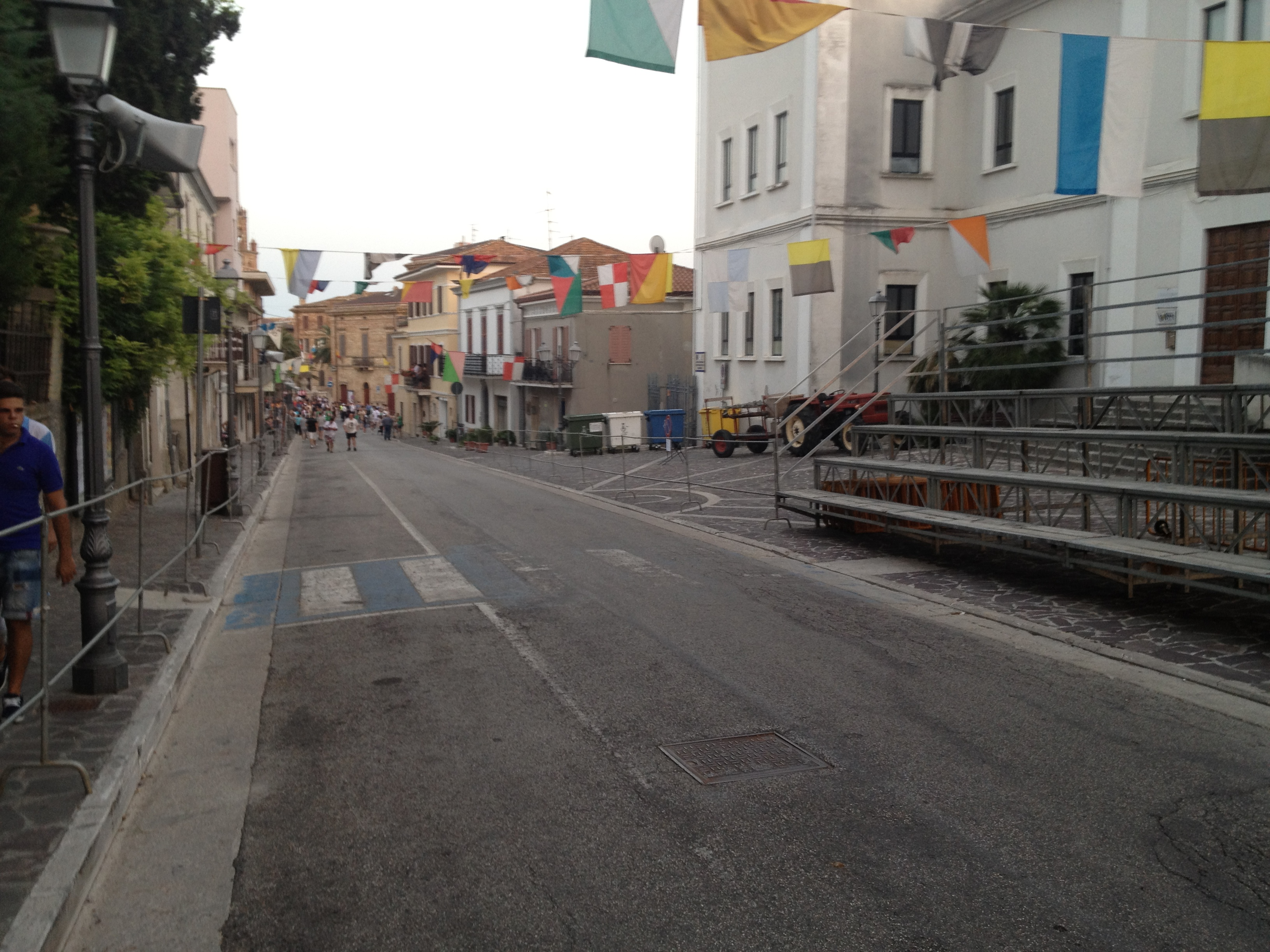 Corropoli - Palio delle Botti - Salita Arrivo